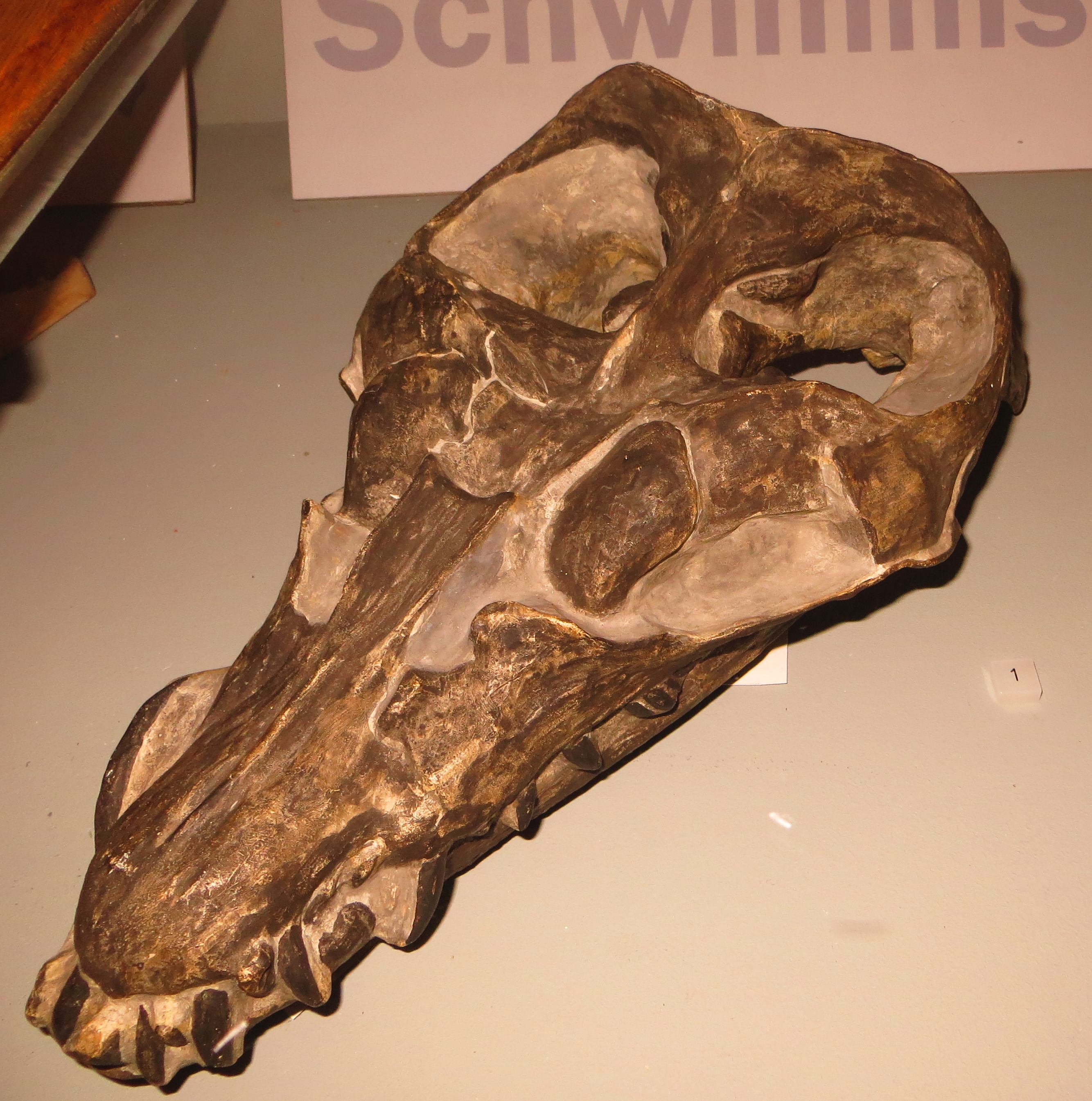 Fossil of Anningasaura, an extinct reptile - Took the picture at Museum of Paleontology, Tuebingen